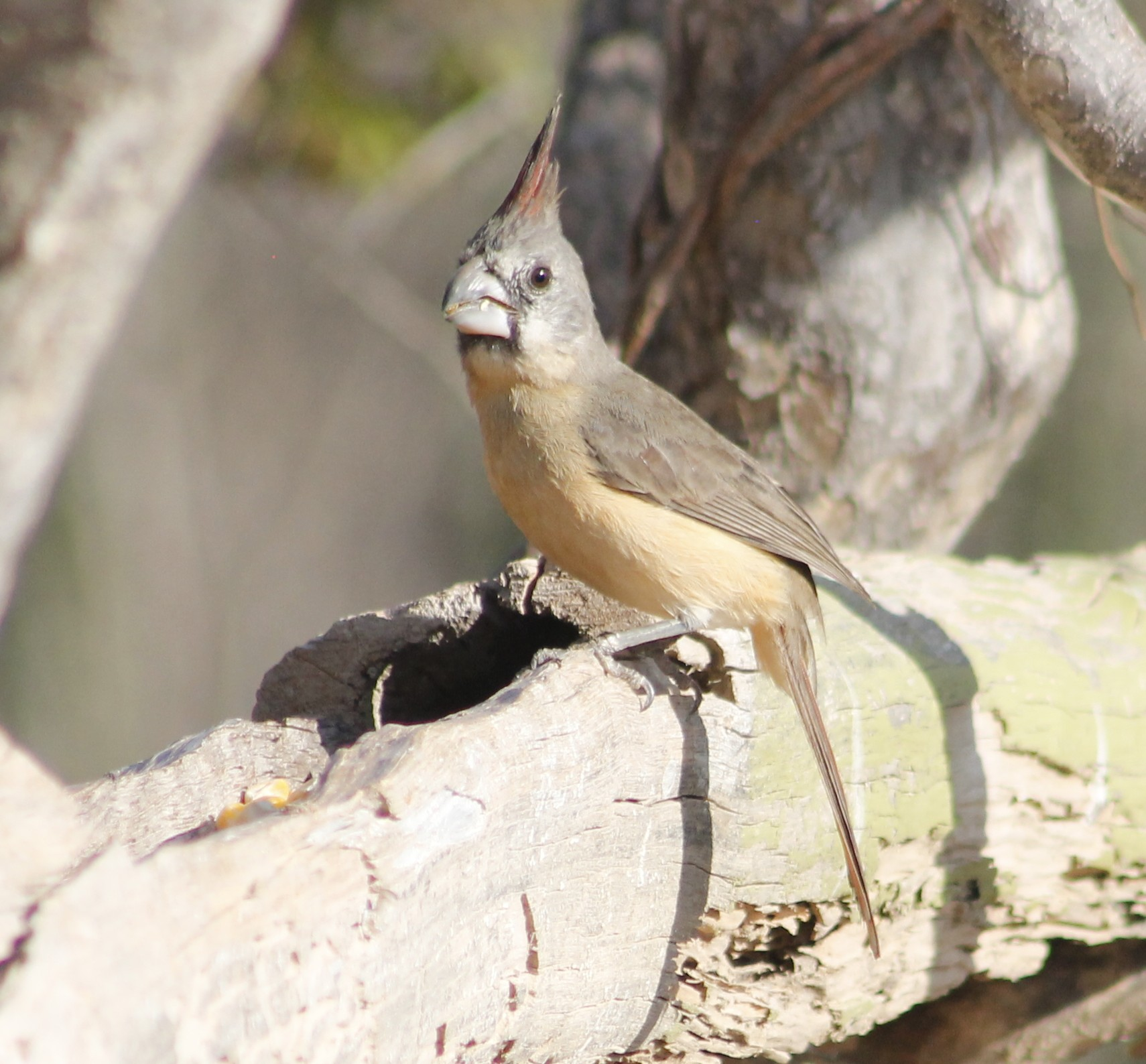 El cardenal guajiro, es una especie de ave paseriforme de la familia Cardinalidae endémica de Colombia y de Venezuela. Se encuentra únicamente en La Guajira y el litoral árido de Venezuela. Su hábitat natural son los arbustales tropicales